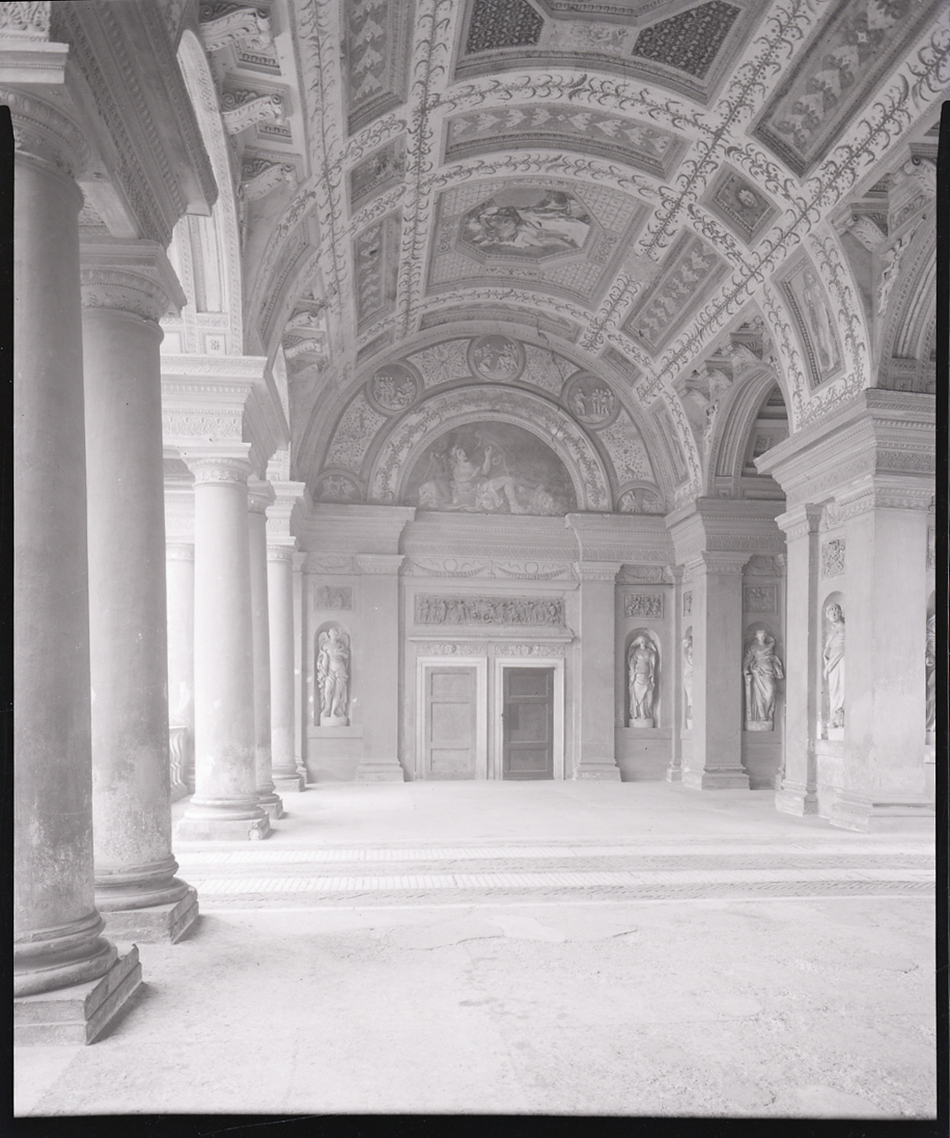 Servizio fotografico : Mantova, 1965 / Paolo Monti. - Buste: 8, Fototipi: 10 : Negativo b/n, gelatina bromuro d'argento/ pellicola ; 10x12. - ((Serie costituita da 8 buste sciolte di negativi identificati con i nn.: 12149, 12150, 12151, 12152, 12153, 12154, 12155, 12156. - La suddetta serie è contenuta nella scatola G12001-12500, formato 24x30. - Occasione: Documentazione per la pubblicazione: Cecchi Emilio, Sapegno Natalino (a cura di), "Storia della Letteratura Italiana", 9 voll., Milano, Garzanti, 1966 e segg. - Fonte: Monografia di Cecchi Emilio, Sapegno Natalino (a cura di): Storia della Letteratura Italiana, 9 voll., Milano, Garzanti (1966 e segg.). - Fonte: Agenda di Paolo Monti: Monti/ 2/ 6 giugno 1964 - 31 marzo 1966/ 8194-12420 (1964-1966), presso Archivio Paolo Monti. - Fonte: Quaderno di Paolo Monti: Foto Leica 1 / 1-51 verde, 1-110 nera (1958-1963), presso Archivio Paolo Monti